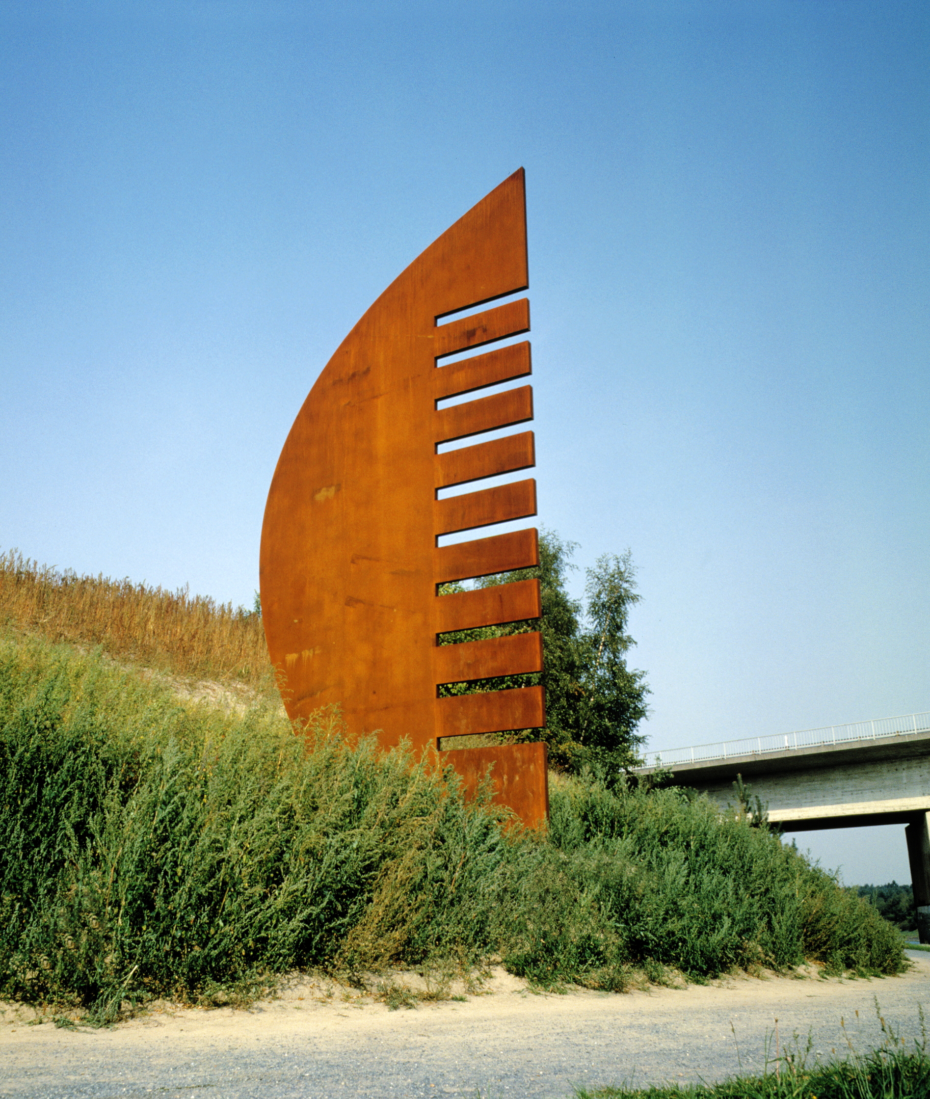 Jürgen Friede - o.T. 1992, Corten-Stahl, 800x360x8cm, Elbe-Seiten-Kanal